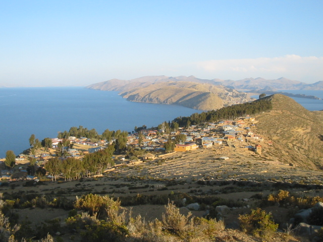 Isola del Sol